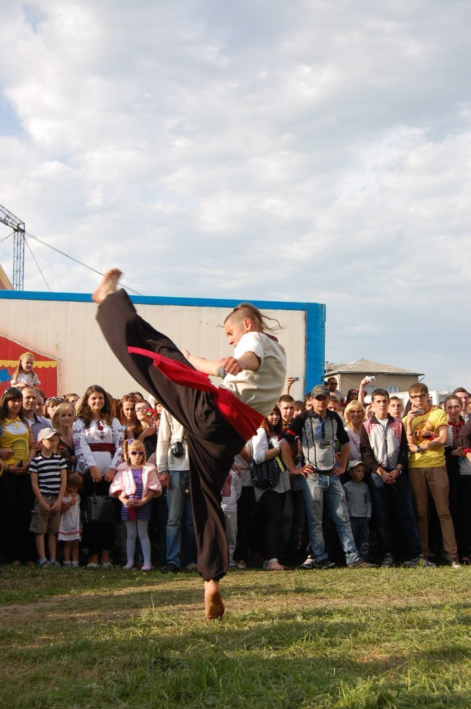 Вишиванка-фест.Бойовий гопак